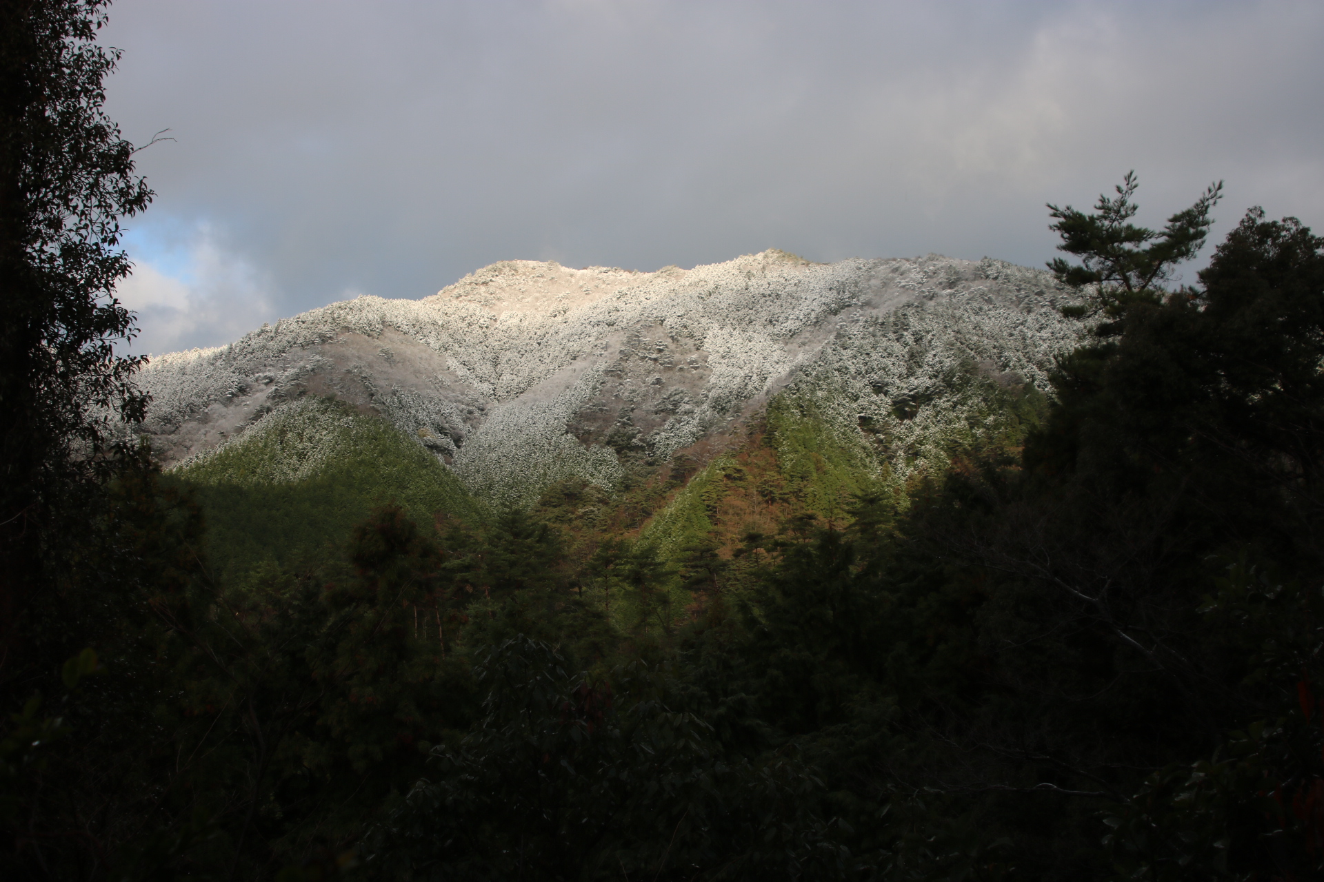 冠雪した東鳳翩山を見上げる